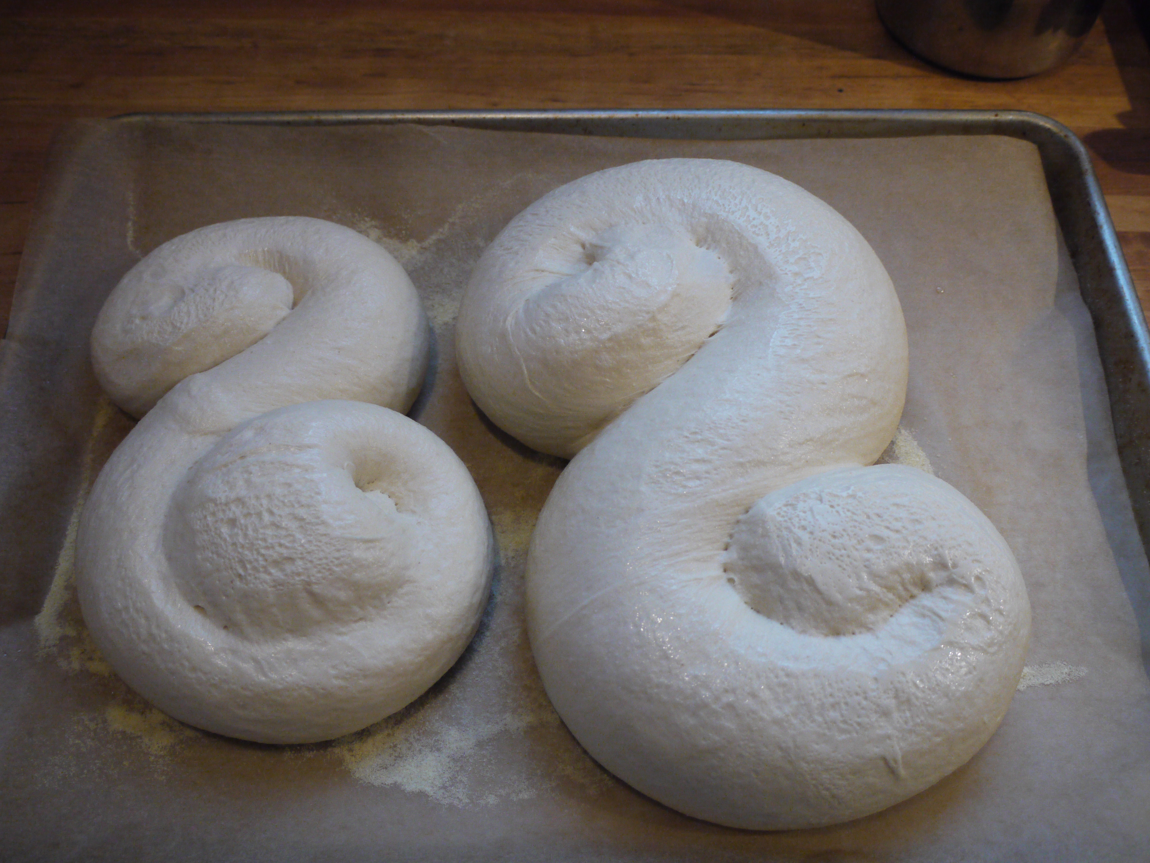 Pane siciliano prima della cottura